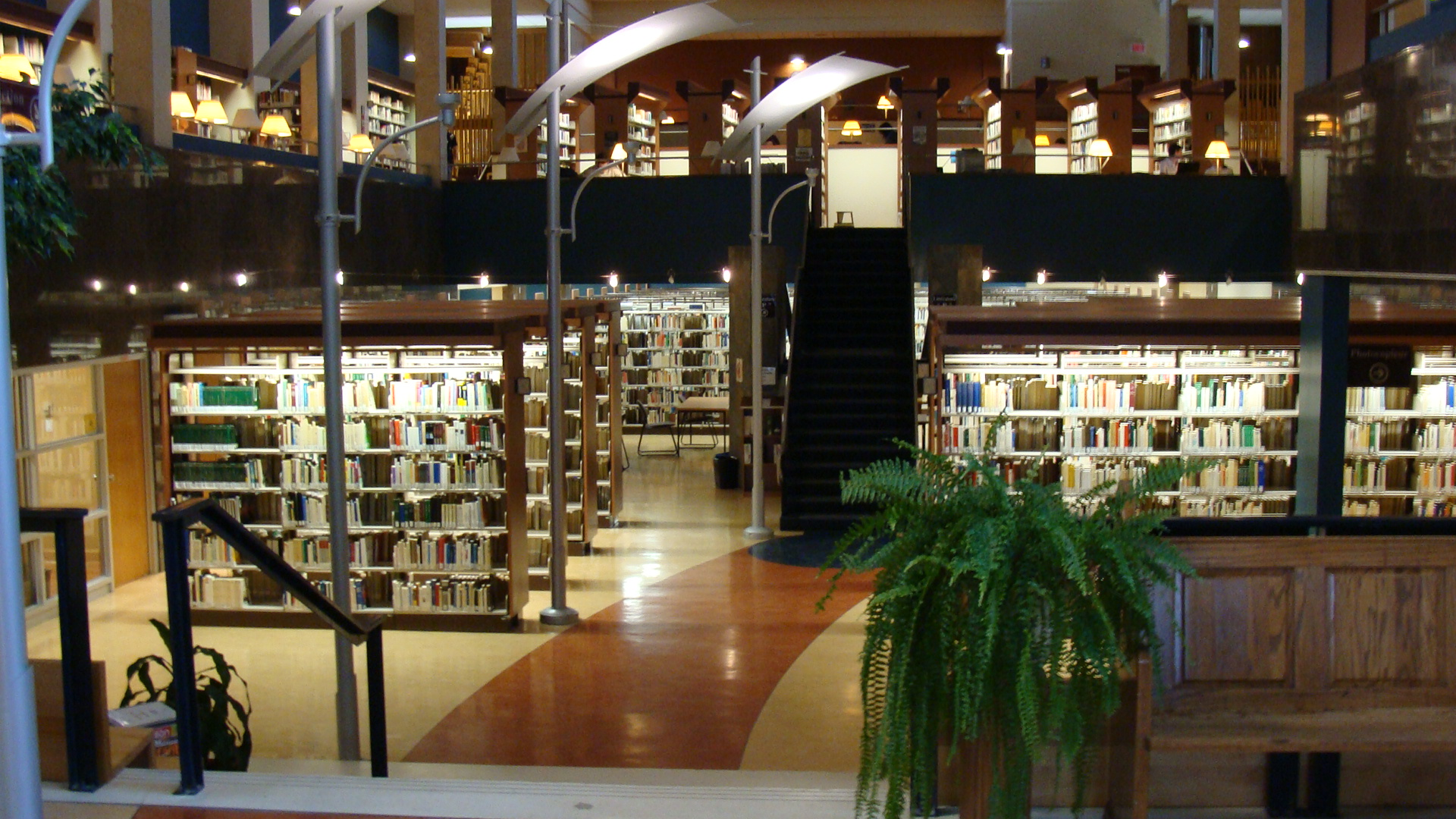 Centre des médias du Cégep de Chicoutimi (4ième étage), au Québec (Canada).